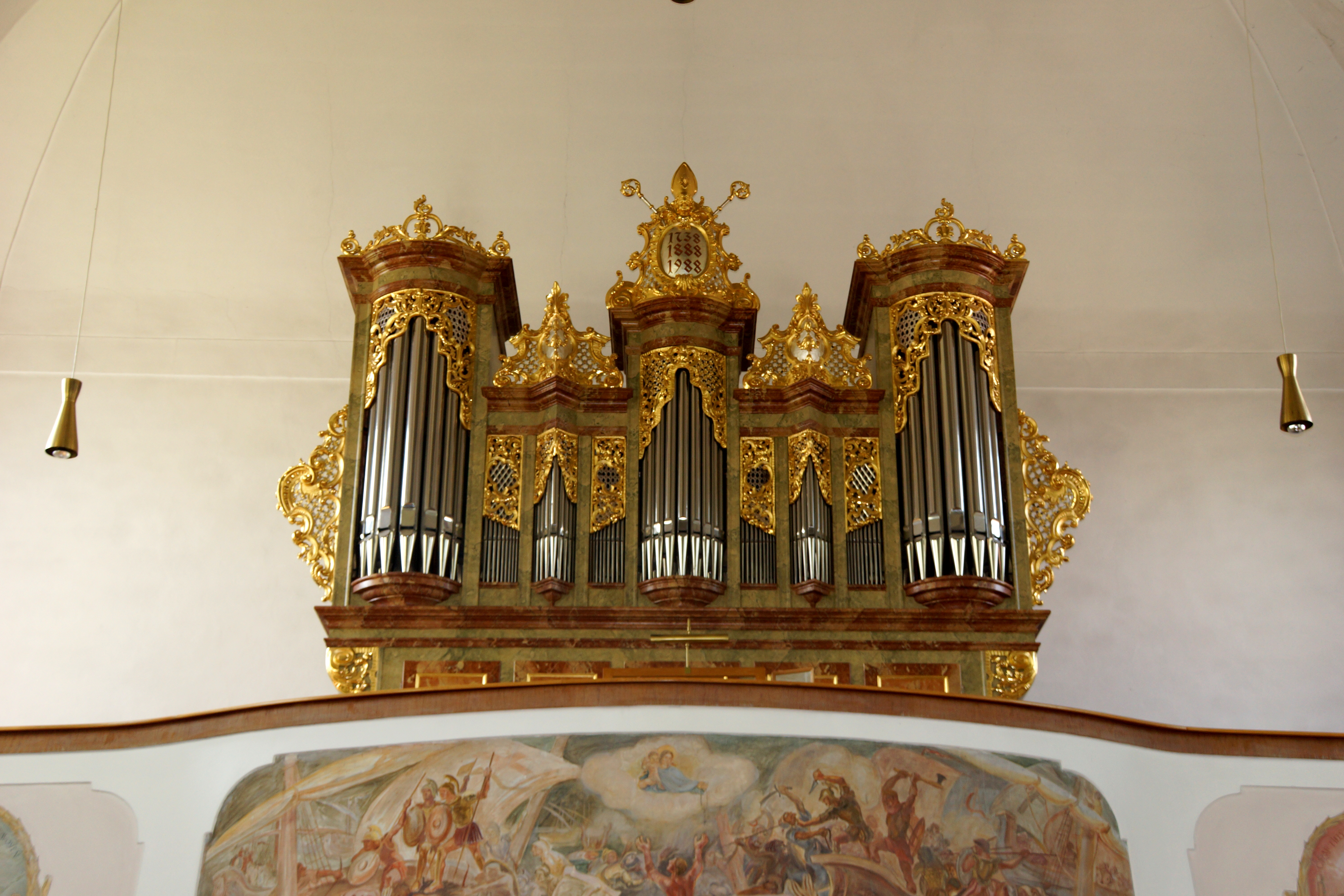 Die katholische Pfarrkirche Mariä Opferung in Duggendorf bei Regensburg